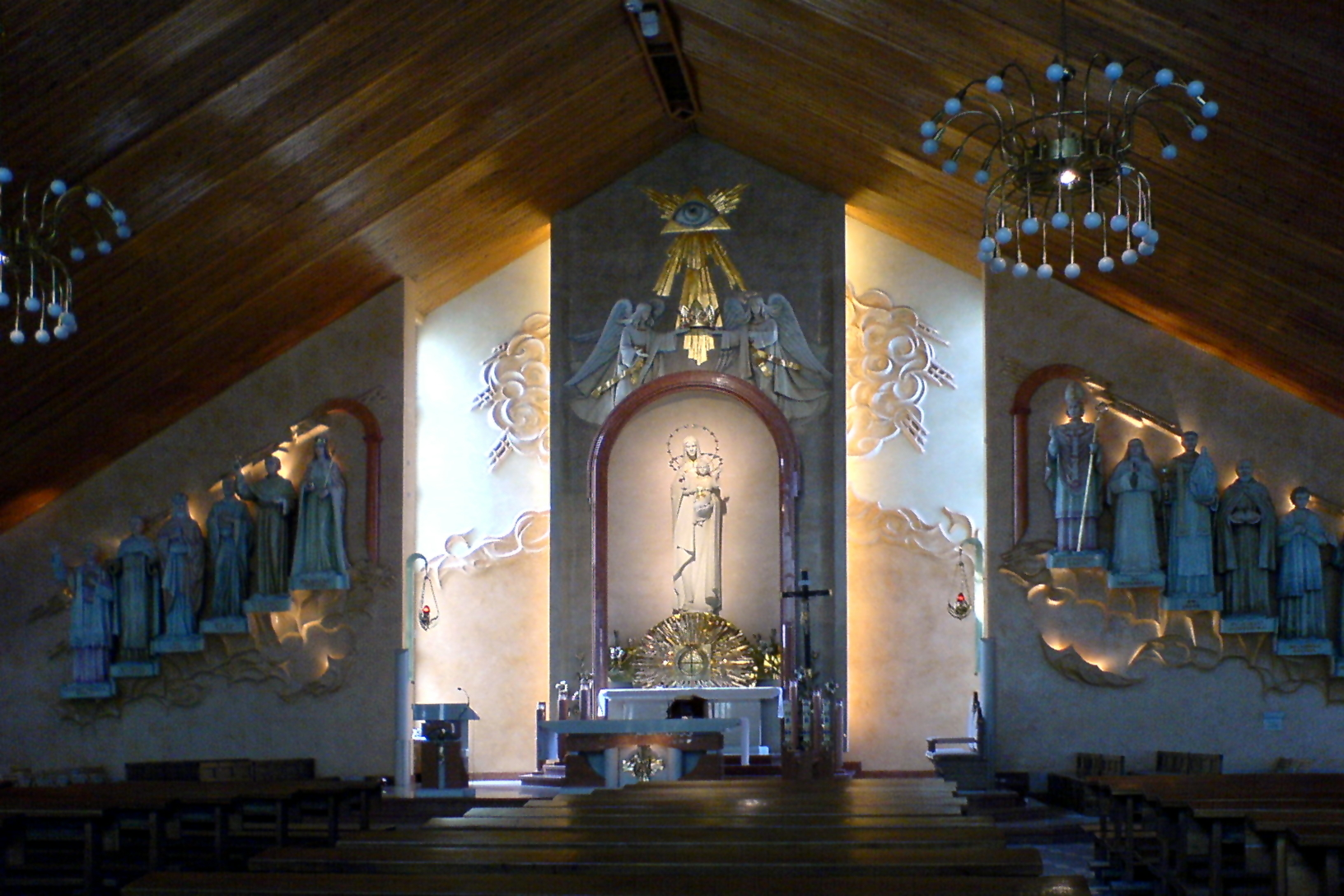 Wnętrze kościoła parafialnego, Kraków-Bieżanów Stary